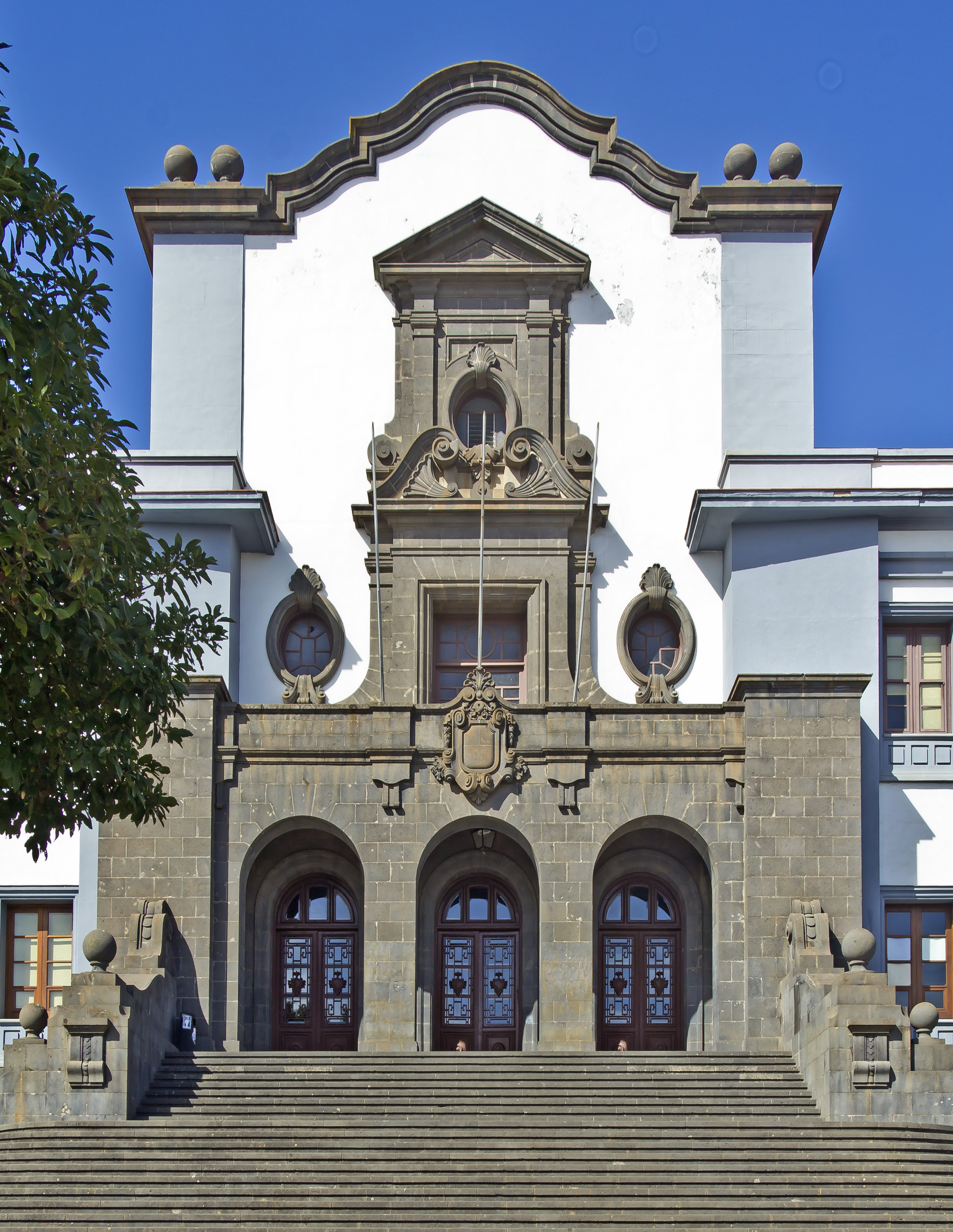 Mittelrisalit des Hauptgebäudes des Campus Central der Universidad de La Laguna (ULL)